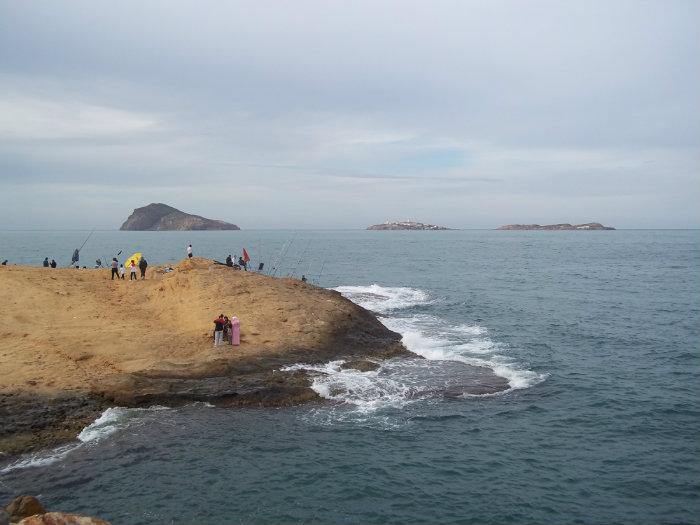 Vista de las islas Chafarinas (España) desde el Cabo de Agua (Marruecos)